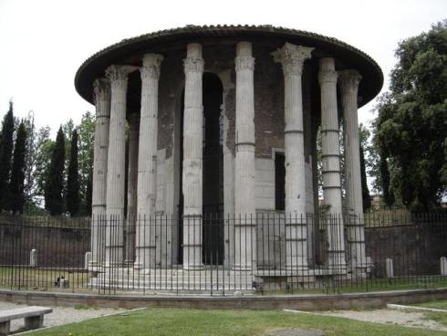 Հերկուլեսի տաճարը Կորիում